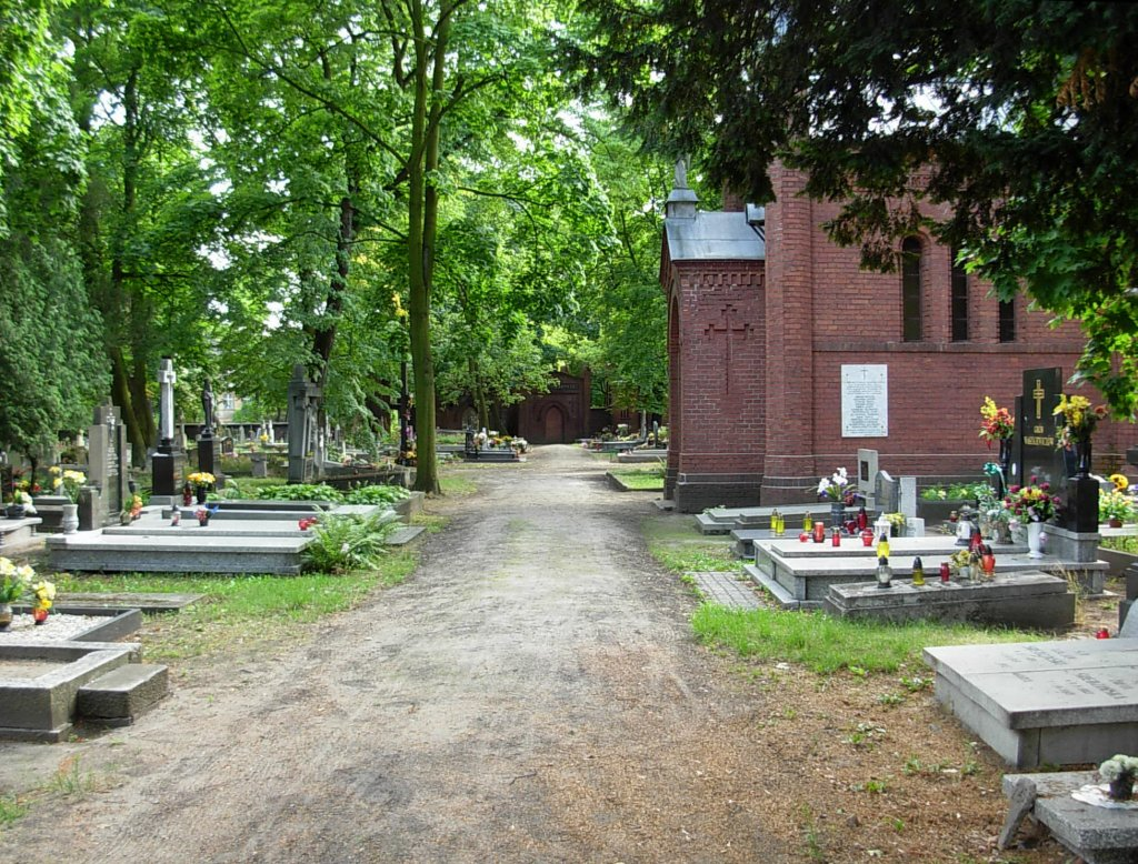 Cmentarz Starofarny Bydgoszcz